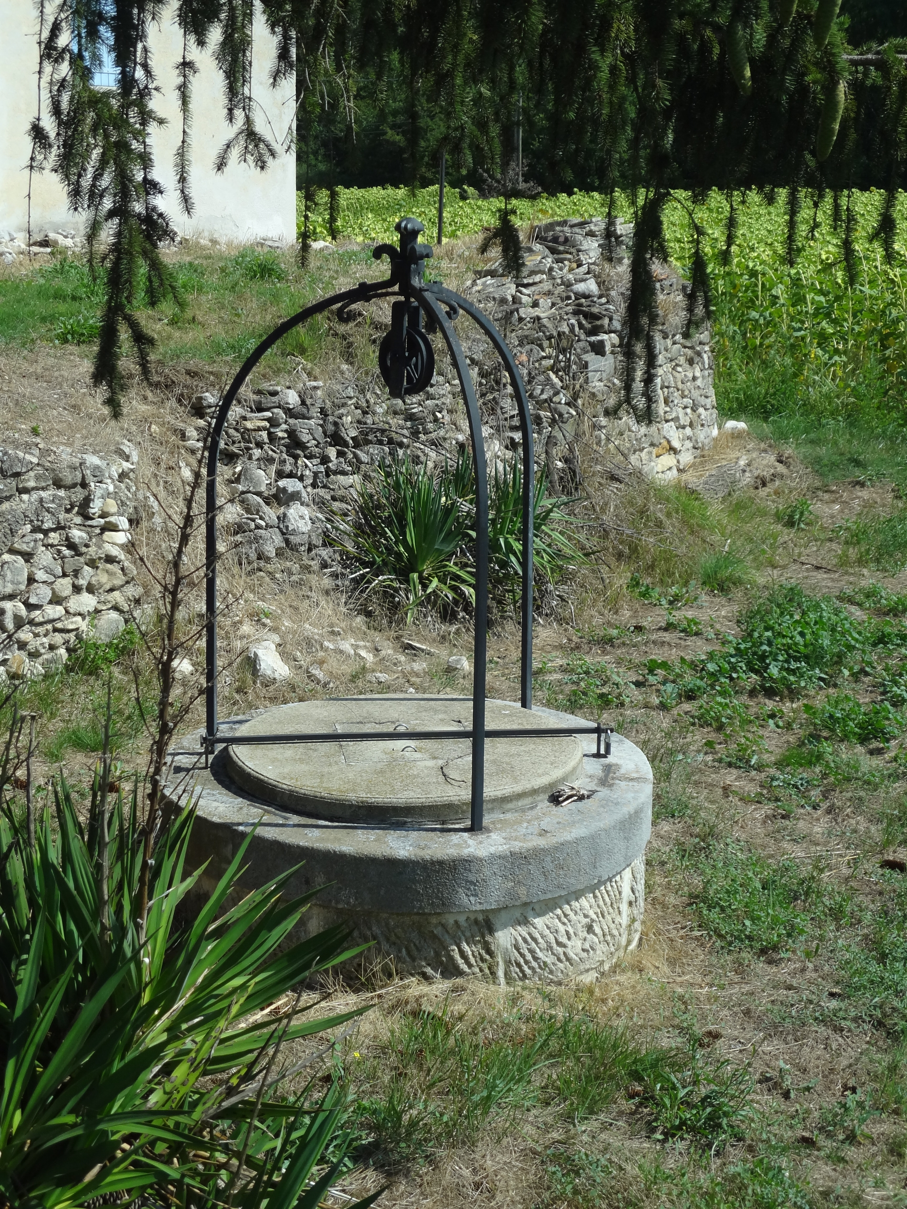 Situé proche d’une ancienne maison de garde-barrière, sur l’ancienne ligne Volx-Apt-Avignon